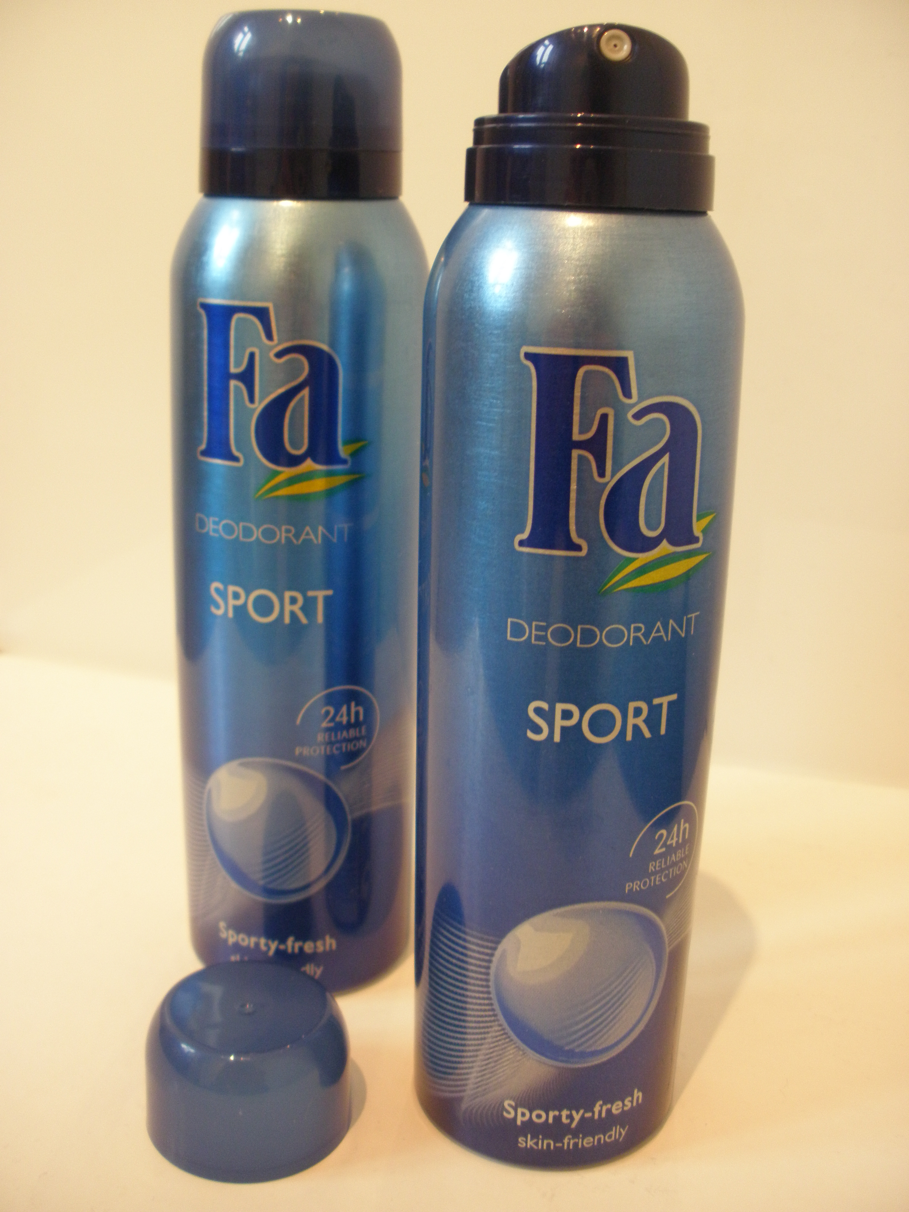 Deodorant van het merk Fa.